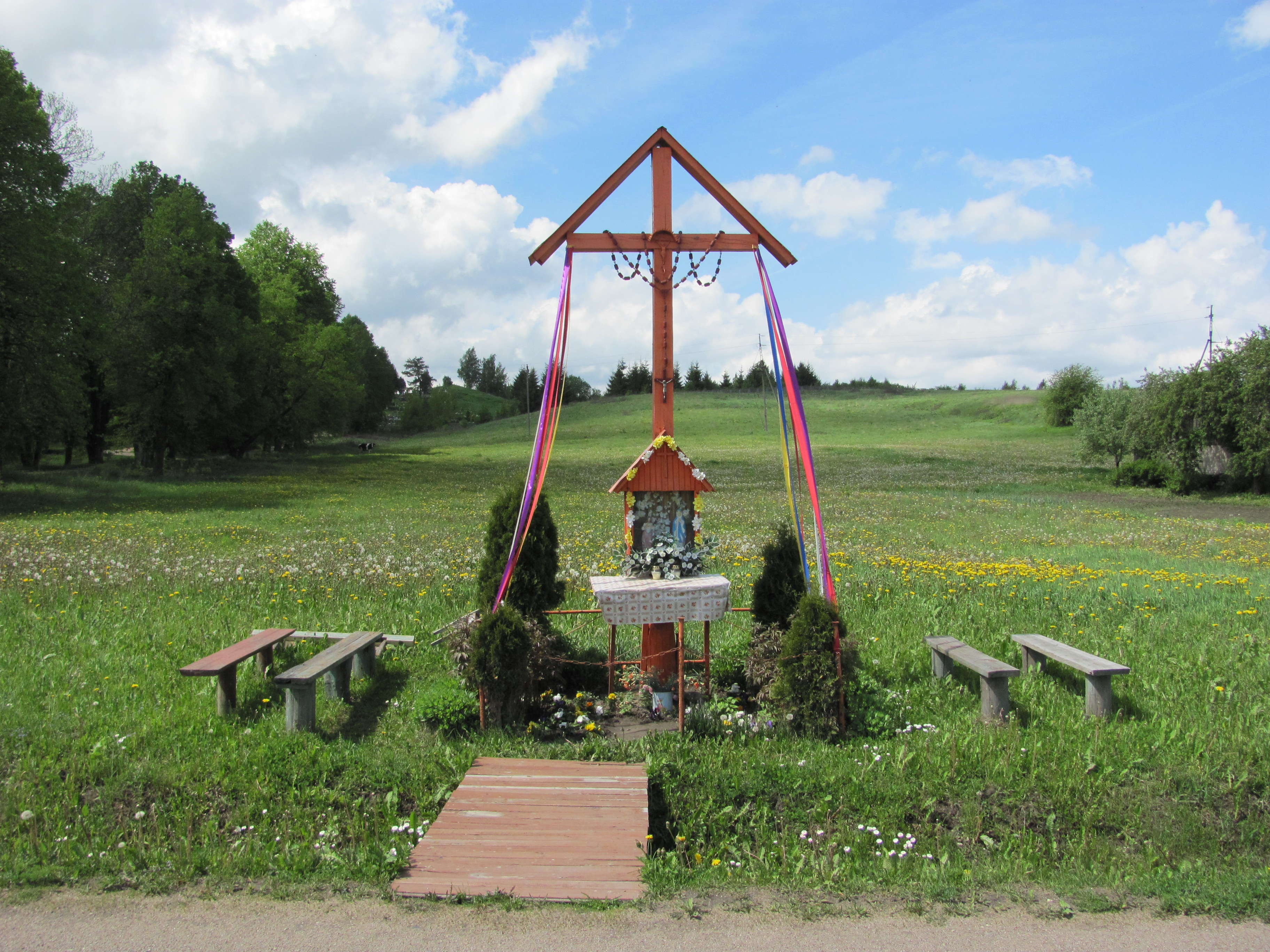 Didžiasalis, Lithuania